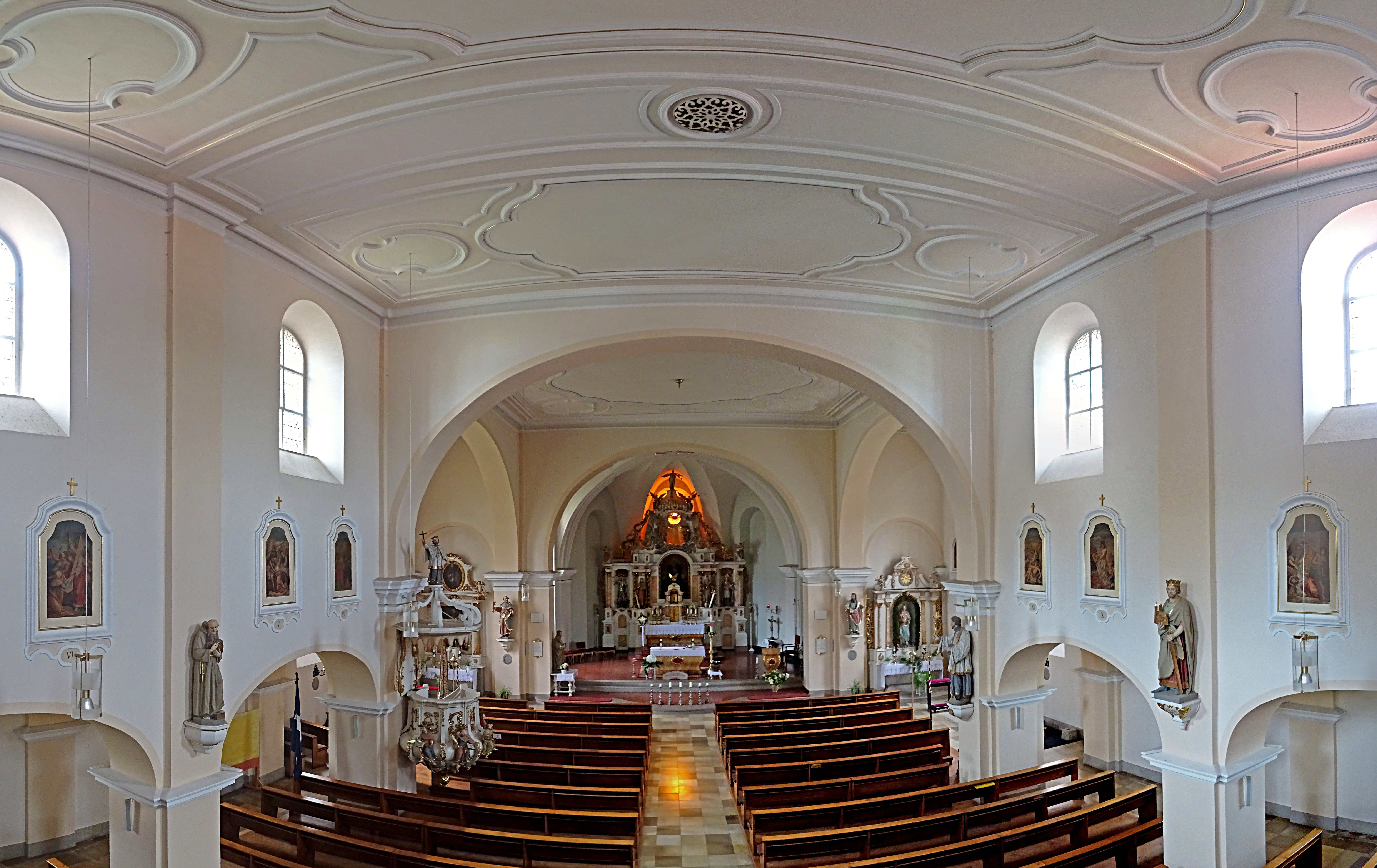 Innenraum Panorama der Dorfkirche St. Cosmas und Damian in Geisleden